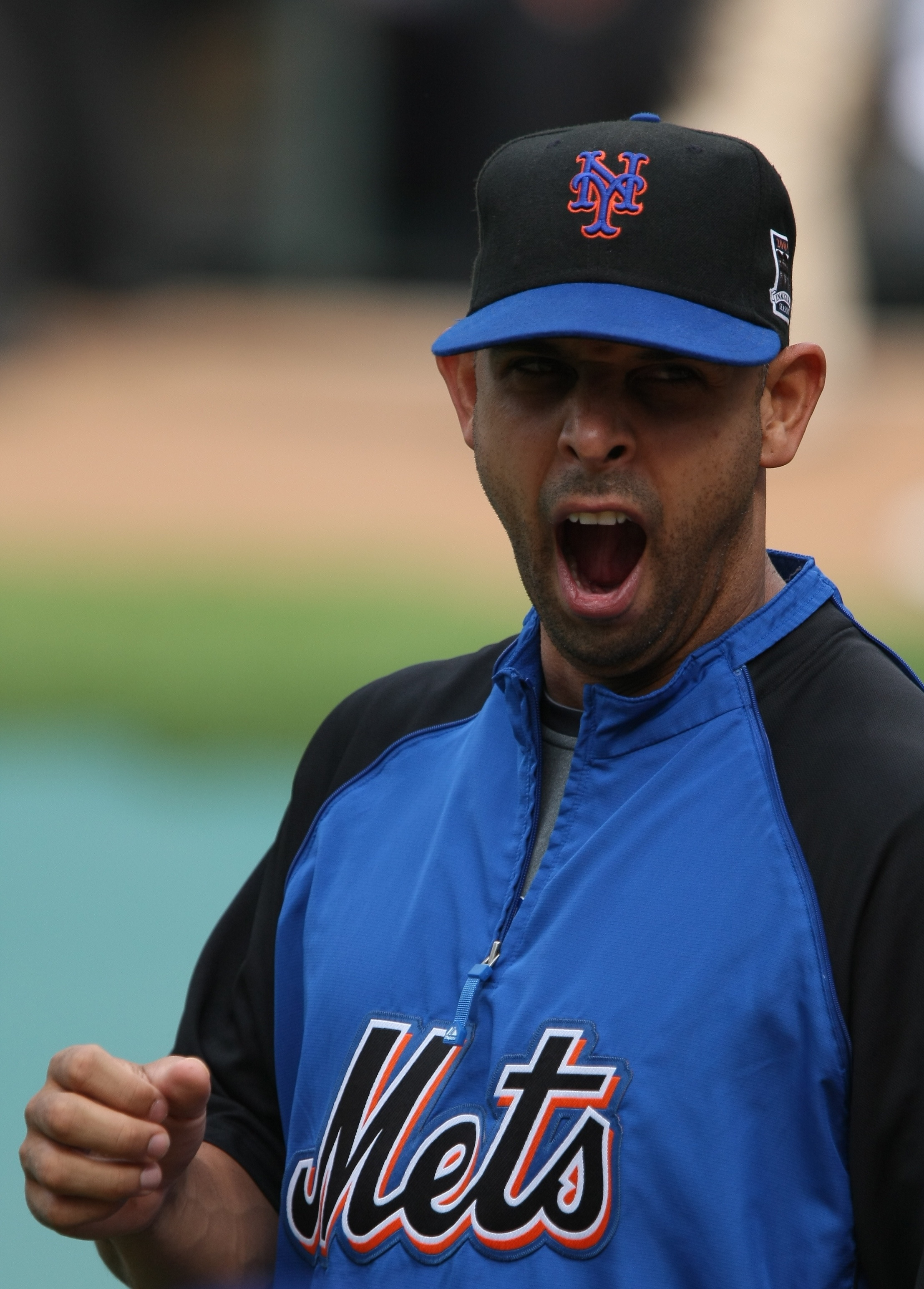 Alex Cora